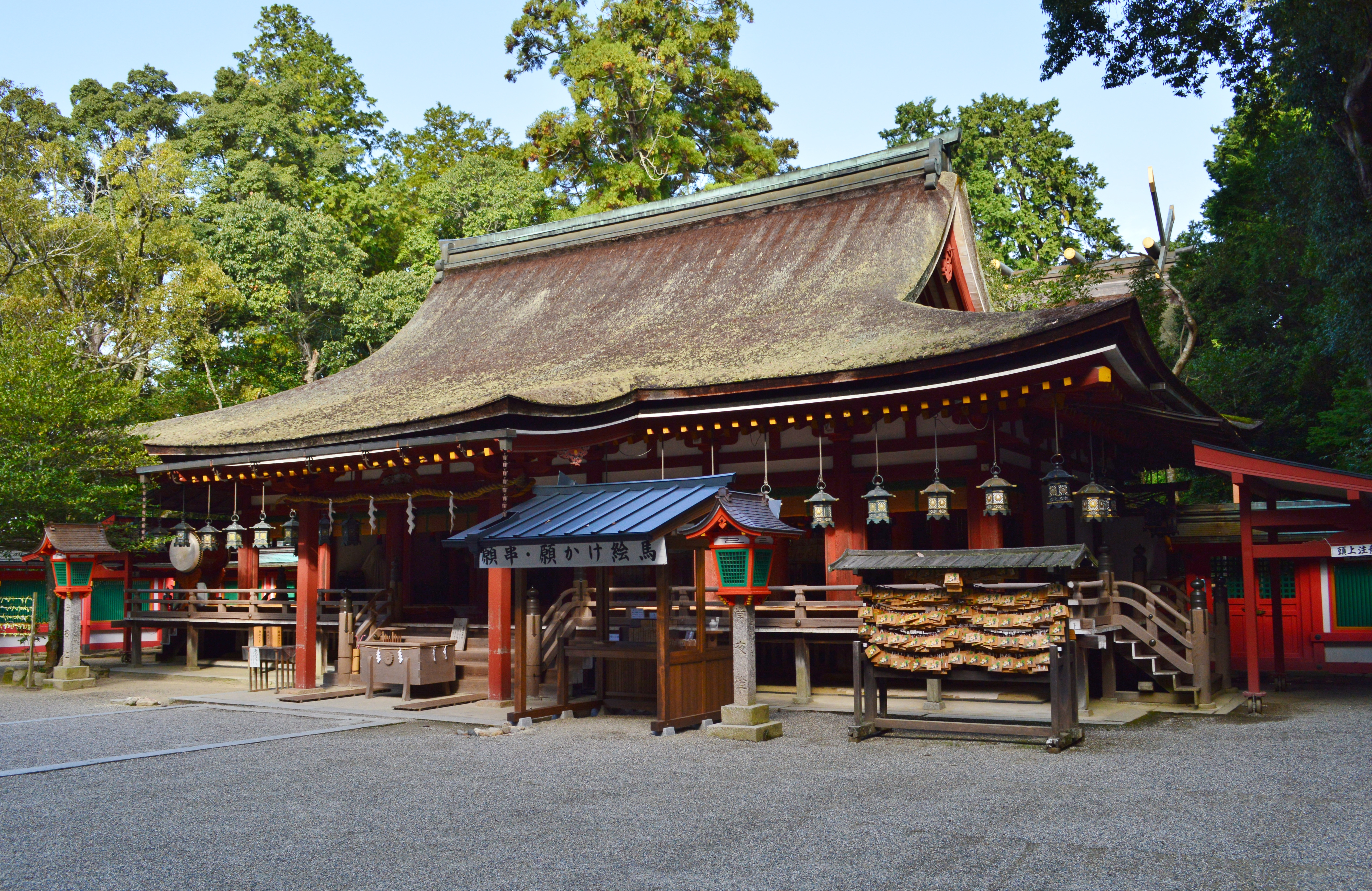 石上神宮 拝殿